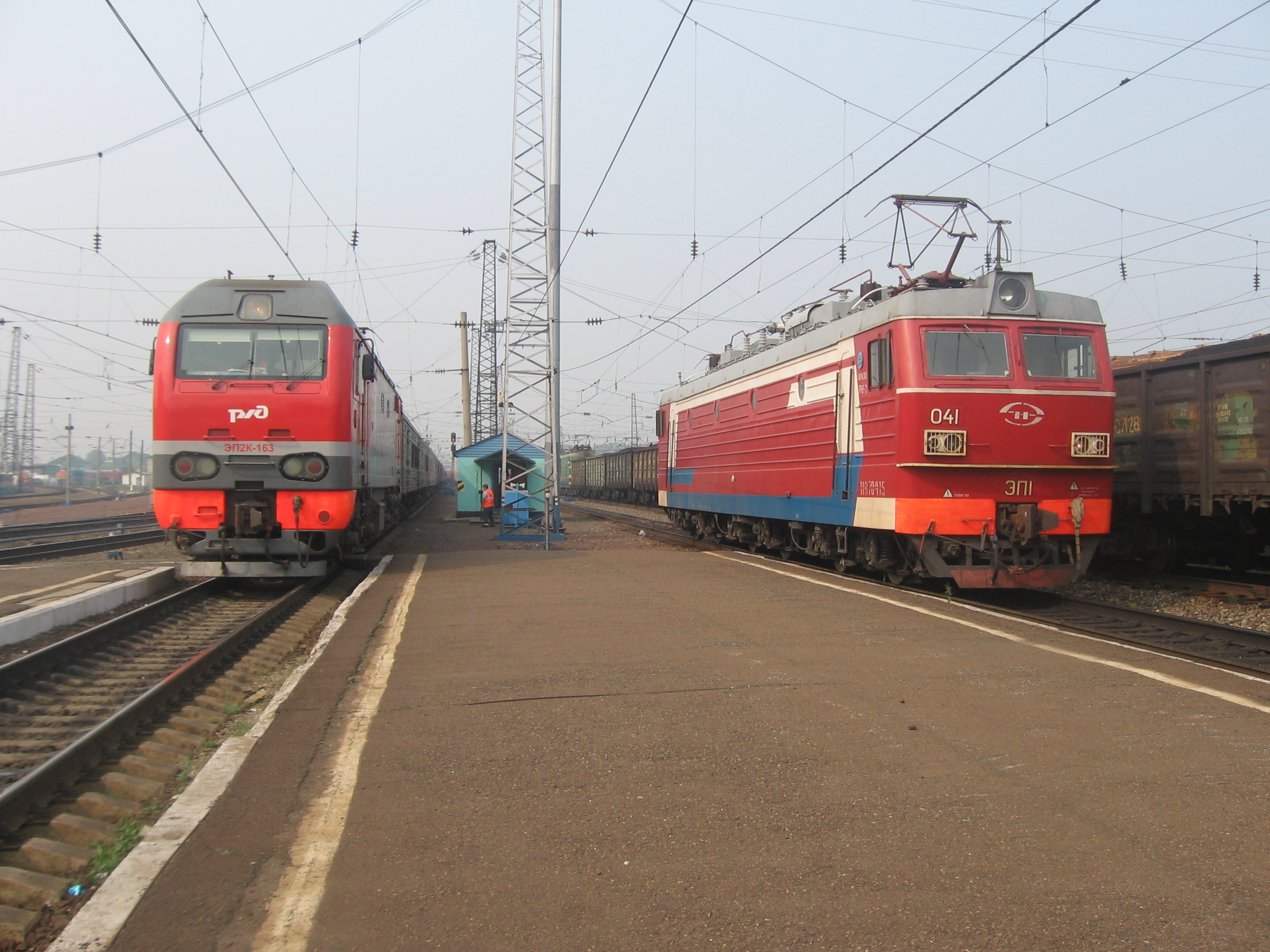 Электровозы разных родов тока на станции стыкования